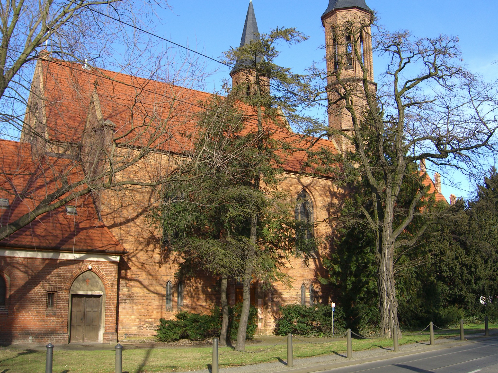 Alte Pfarrkirche „Zu den vier Evangelisten“, Berlin-Pankow